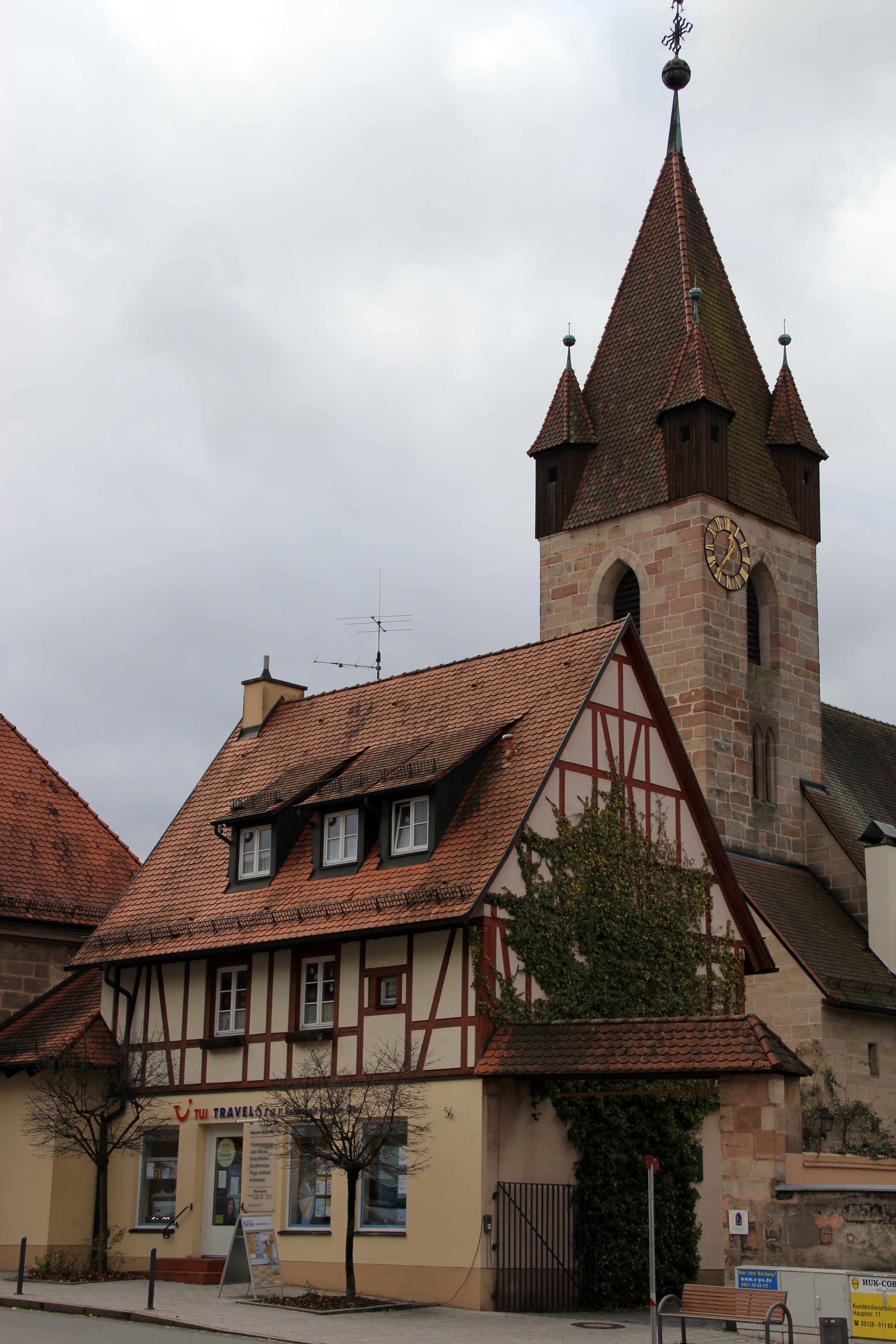 Jakobskirche in Feucht, Blick von Nordost nach Südwest